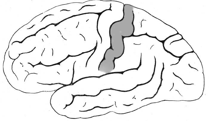 Großhirn mit Hervorhebung des Gyrus postcentralis